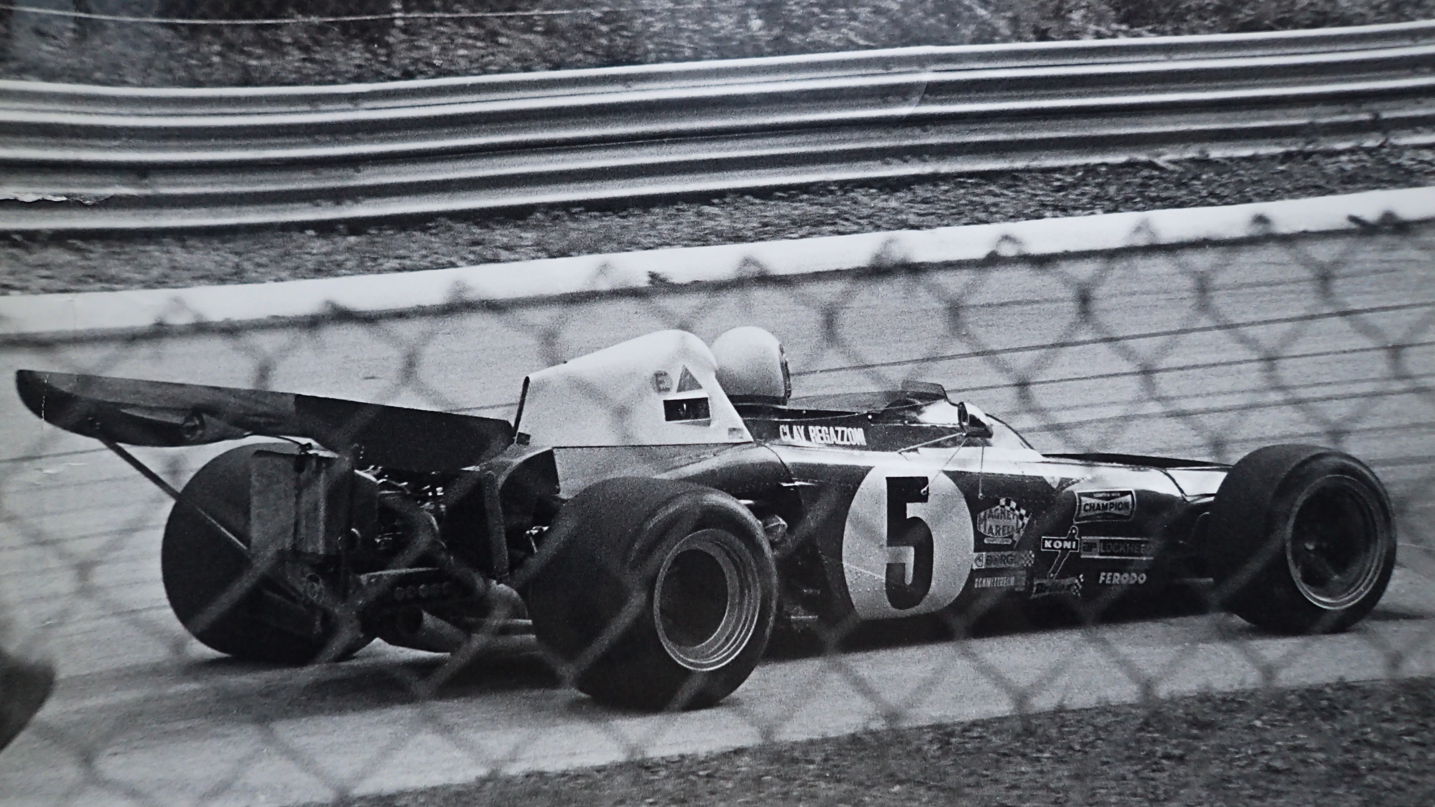 Gran Premio d'Italia di Formula 1 del 1972. Circuito di Monza, variante del Vialone. Clay Regazzoni su Ferrari 312 B2.